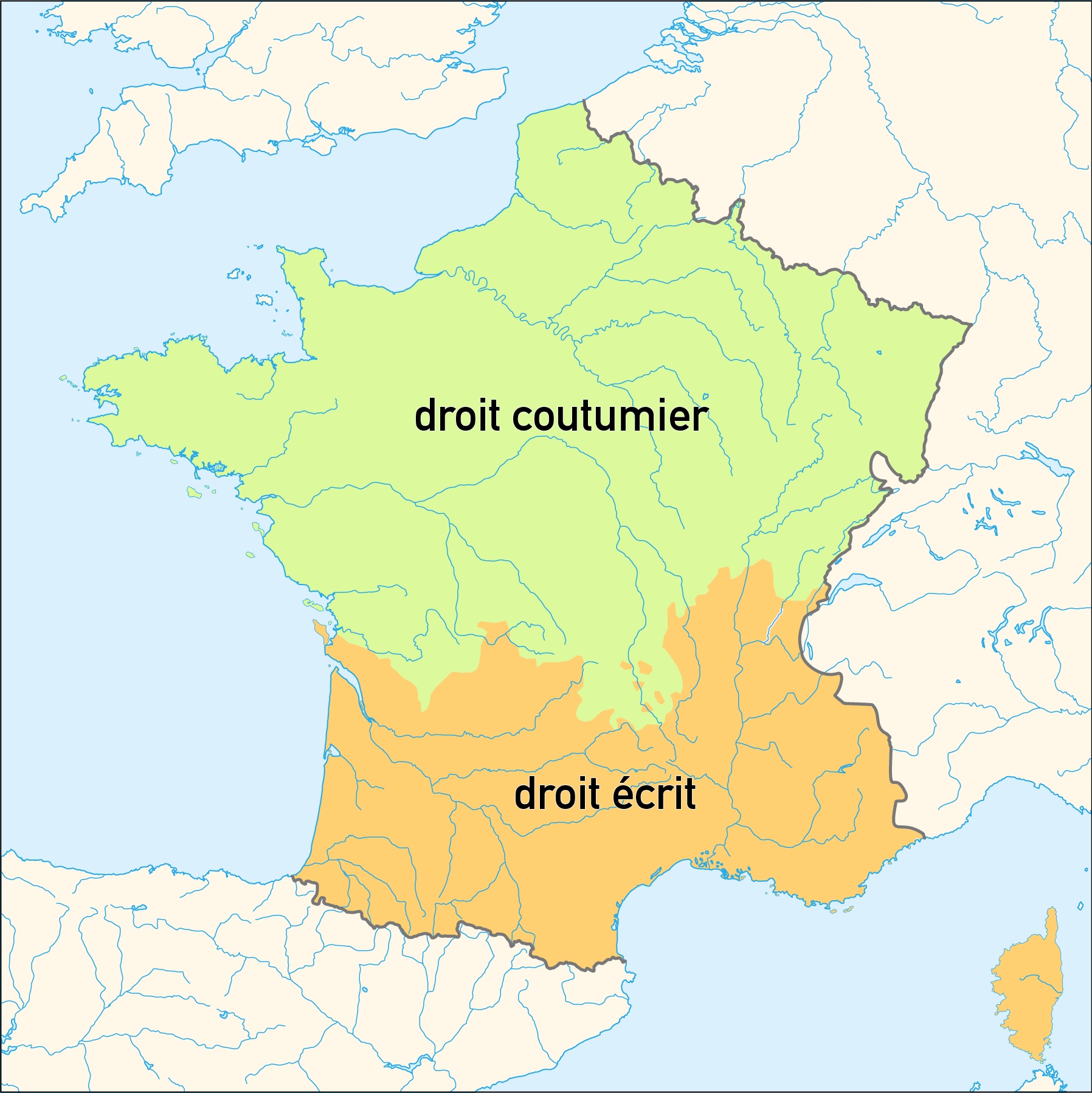 Karte der Rechtskreise des droit écrit (Römisches Recht) und des droit coutumier (Gewohnheitsrecht) im französischen Ancien Regime